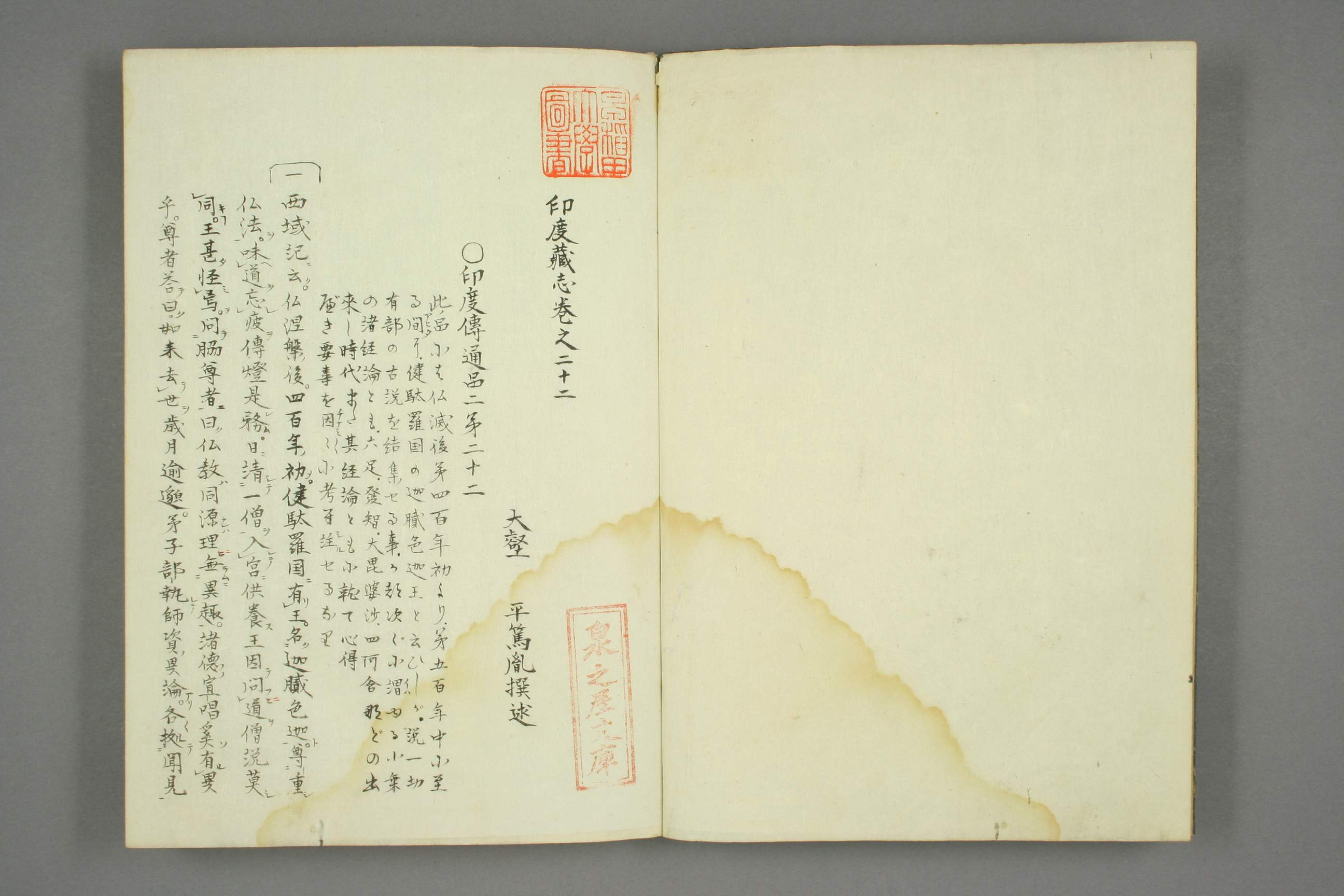 平田篤胤（1776ｰ1843）『印度蔵志』1860年代に出版